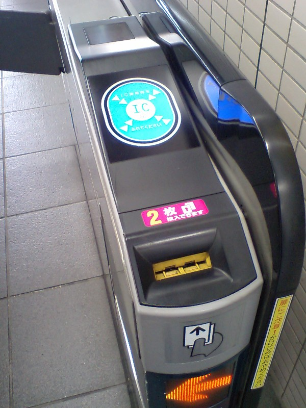 PASMO対応改札 (京浜急行電鉄空港線 大鳥居駅)